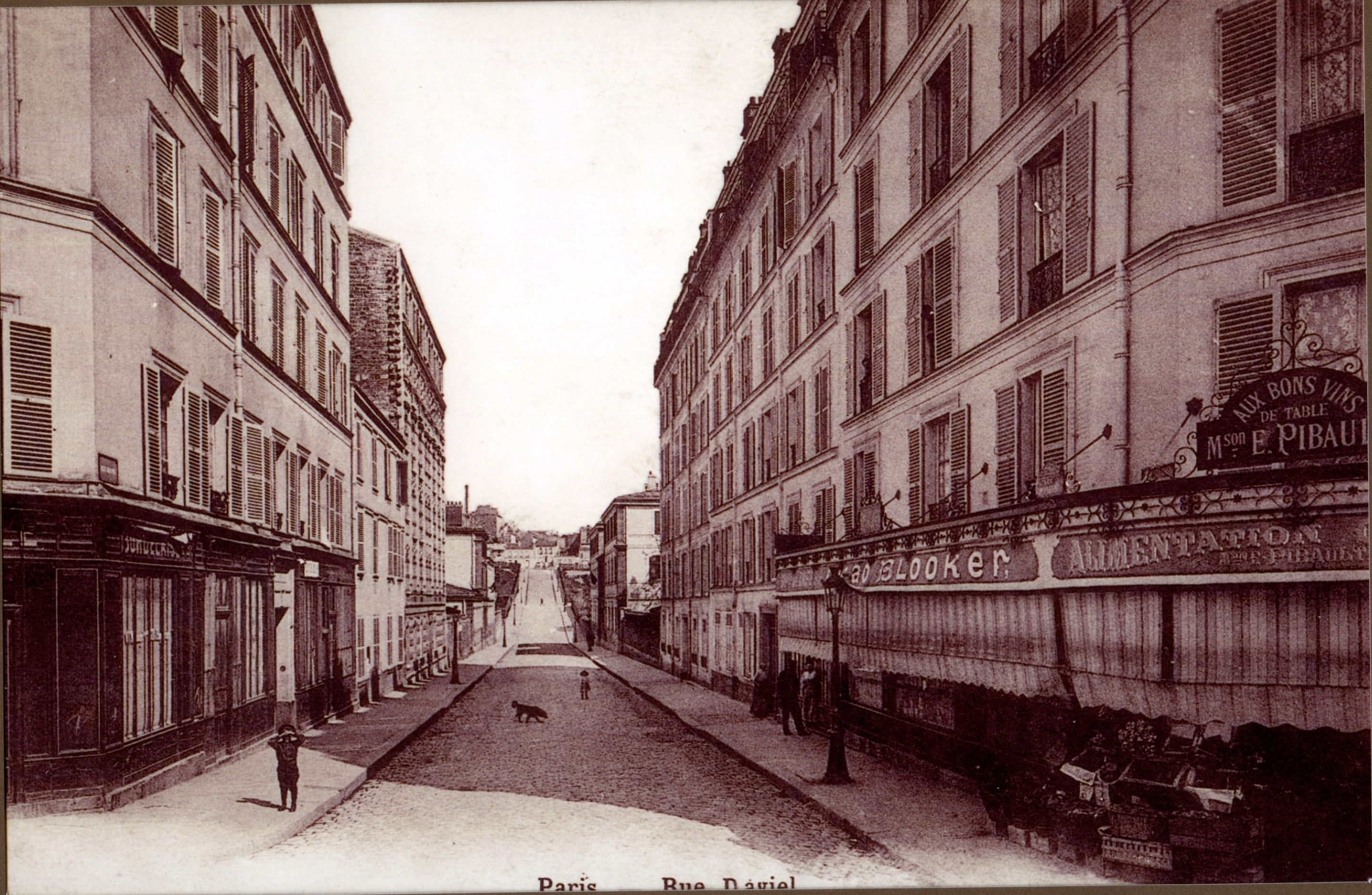 Rue Daviel, Paris, au début du XXème siècle.